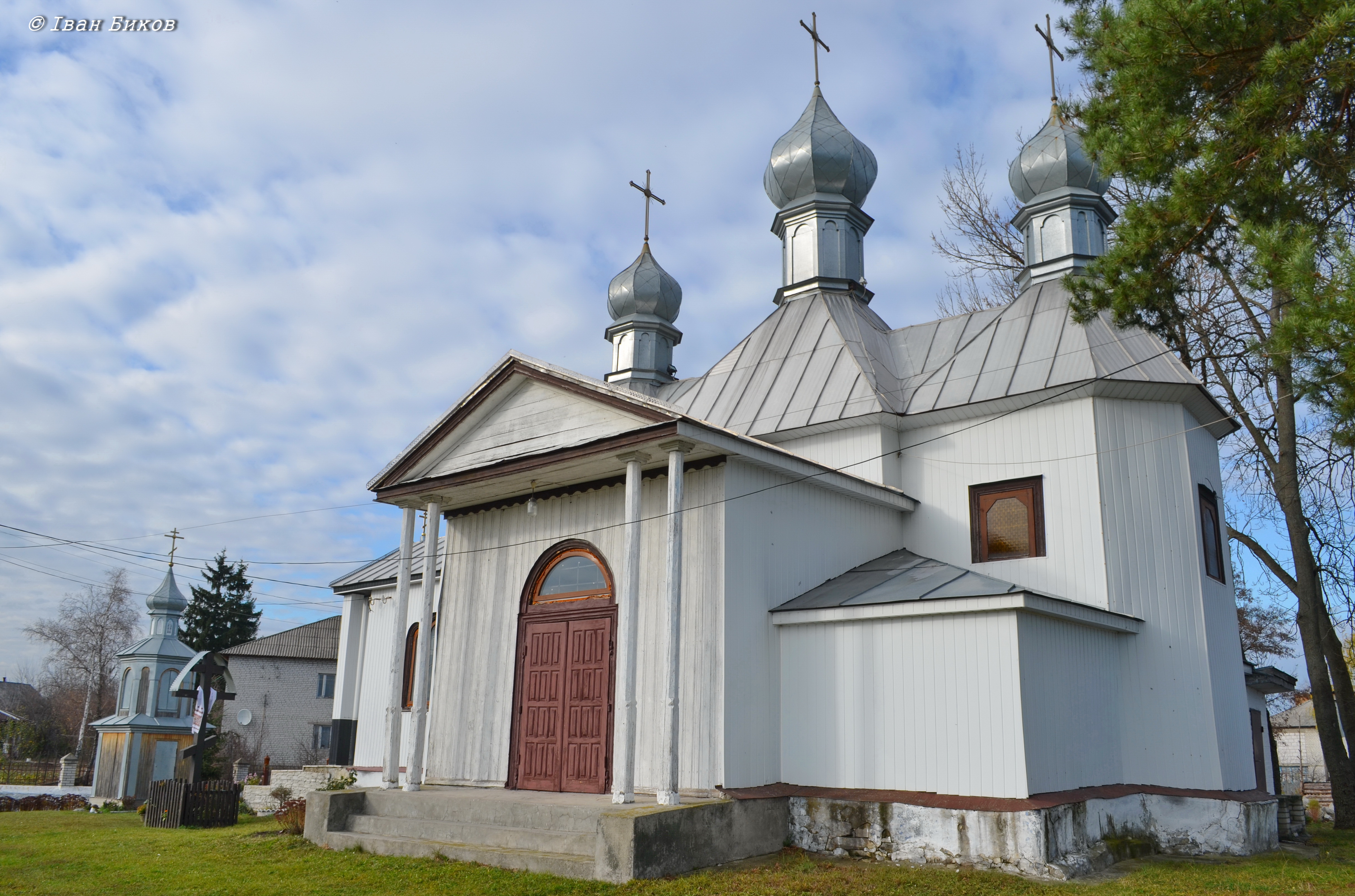 Бушеве. Троїцька церква. 1760 р. Пам'ятку архітектури національного значення обшили пластиковою вагонкою і храм гине !